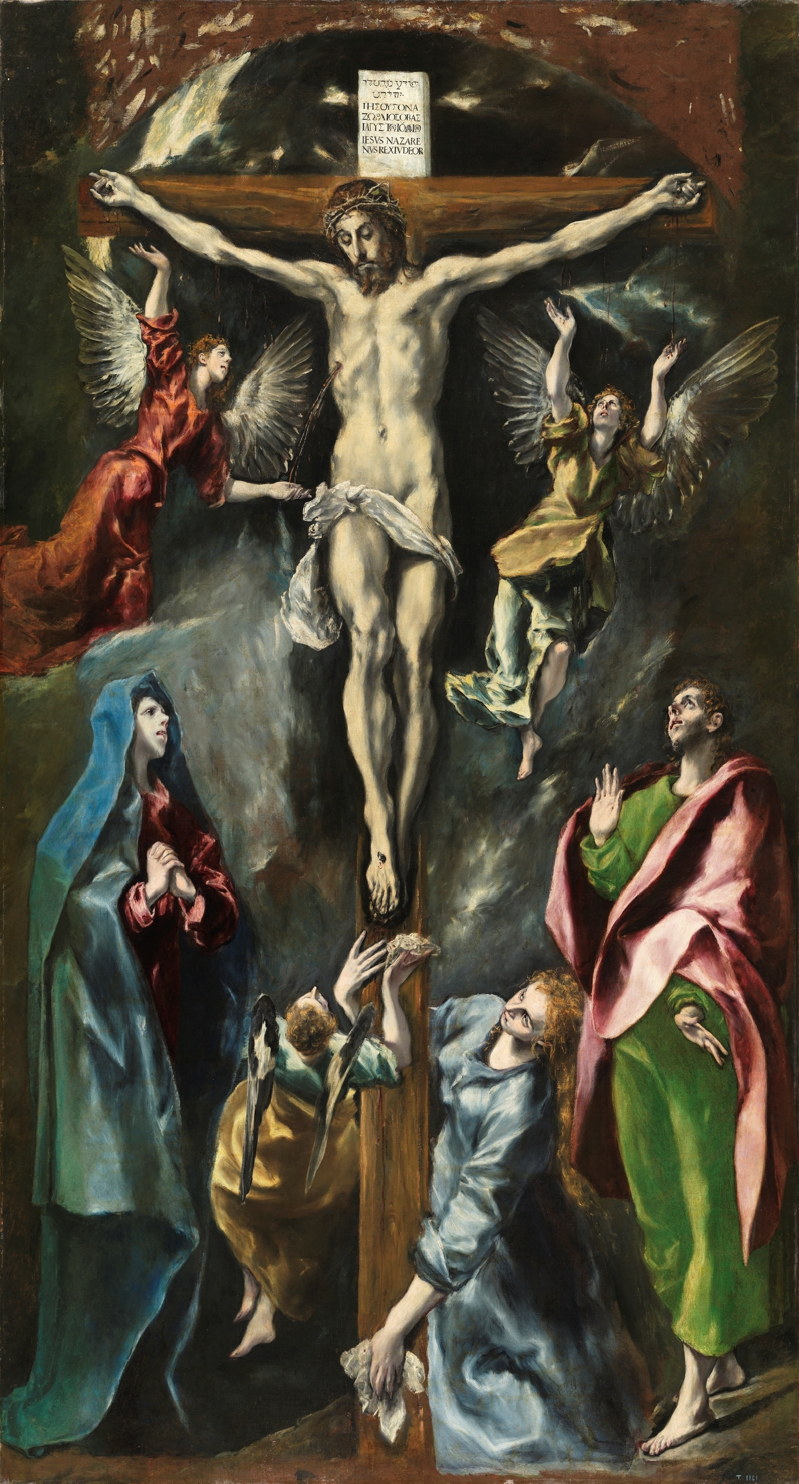 La obra representa a Jesucristo crucificado, hallándose a sus pies su madre, la Virgen María, San Juan Evangelista y María Magdalena, entre otros personajes.